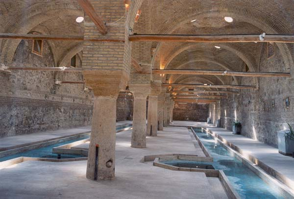 Rakhtshur Kahneh in Zanjan, Iran